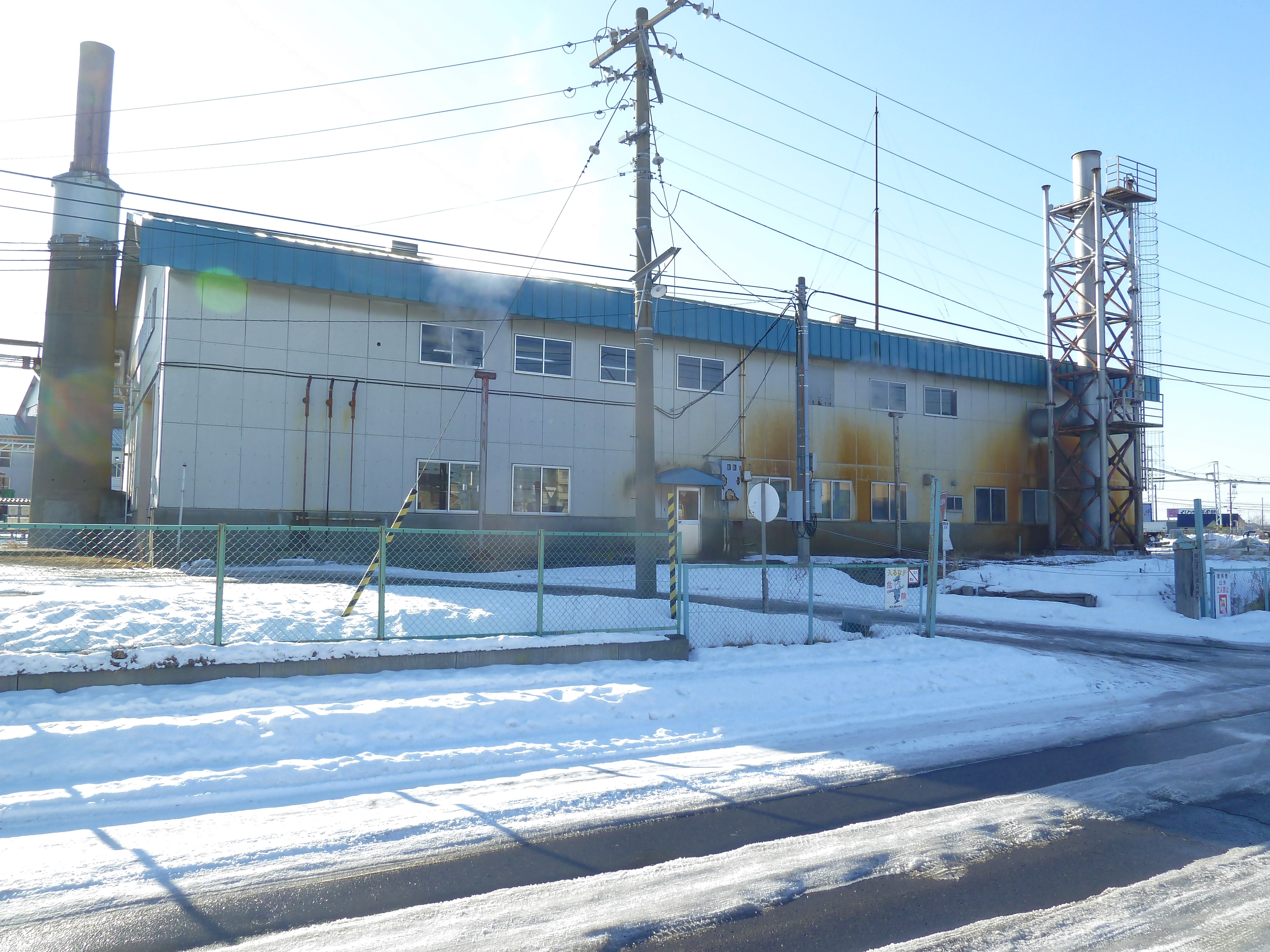 JR北海道釧路運輸車両所の社屋